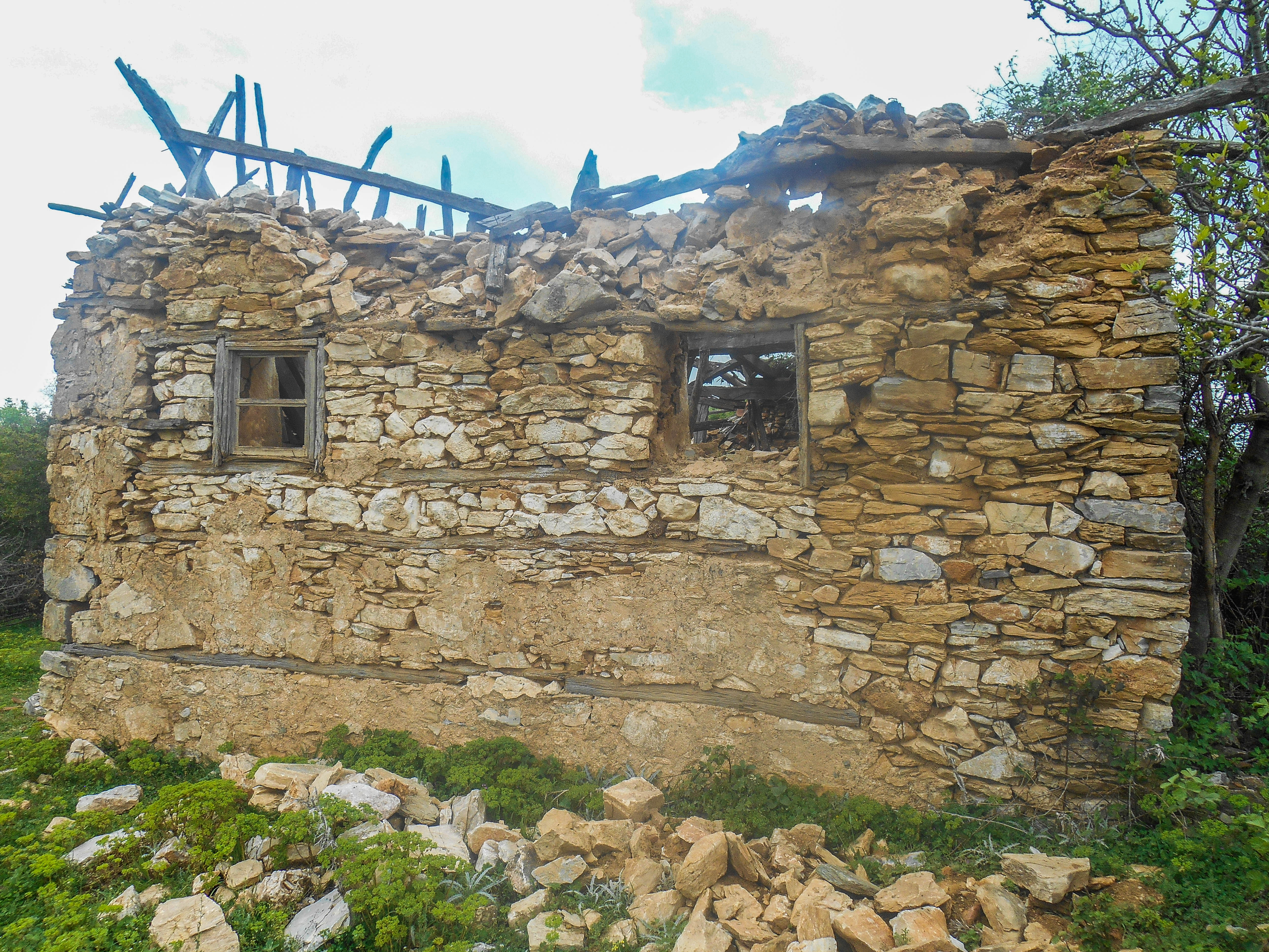 Куќа во селото